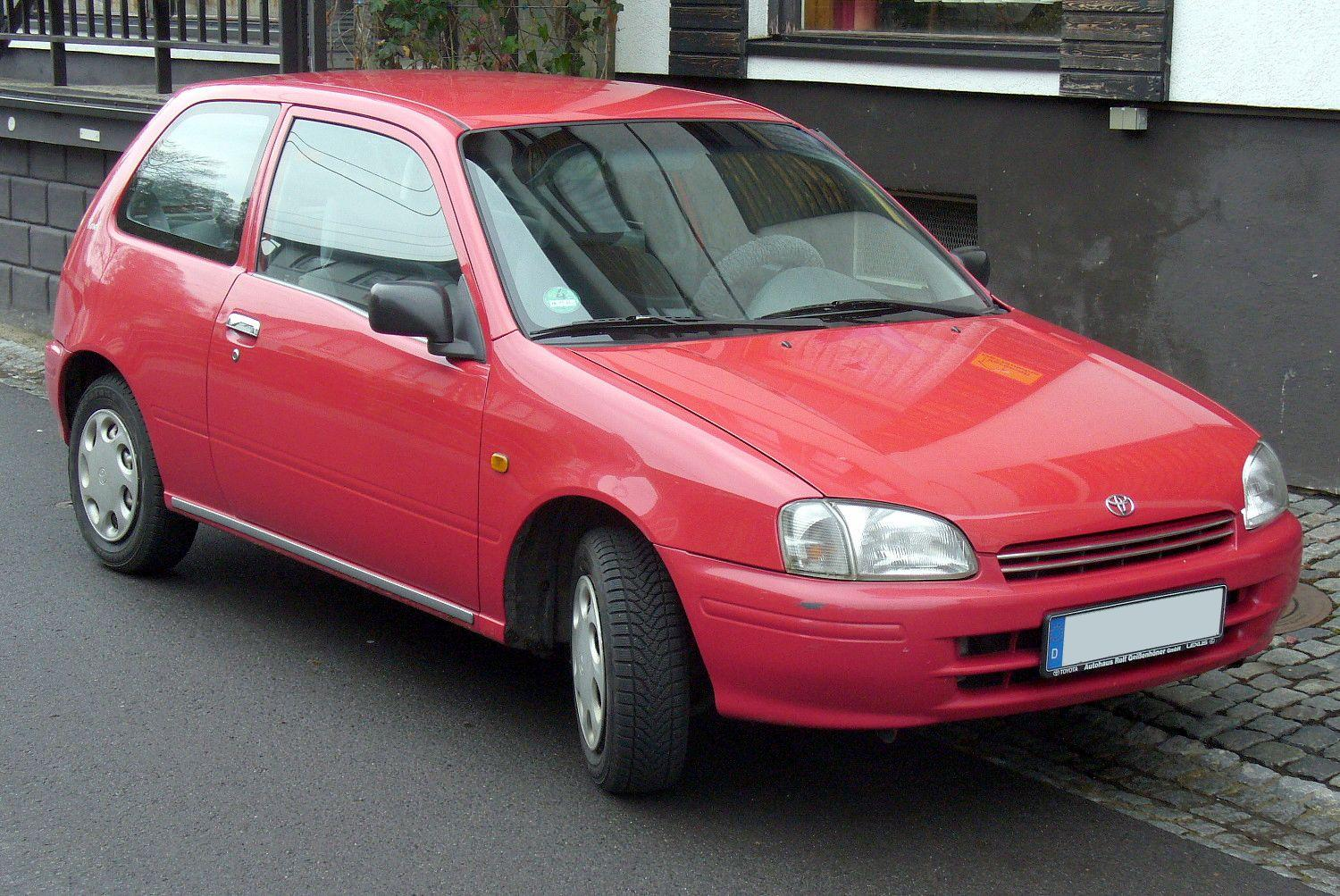 Toyota Starlet